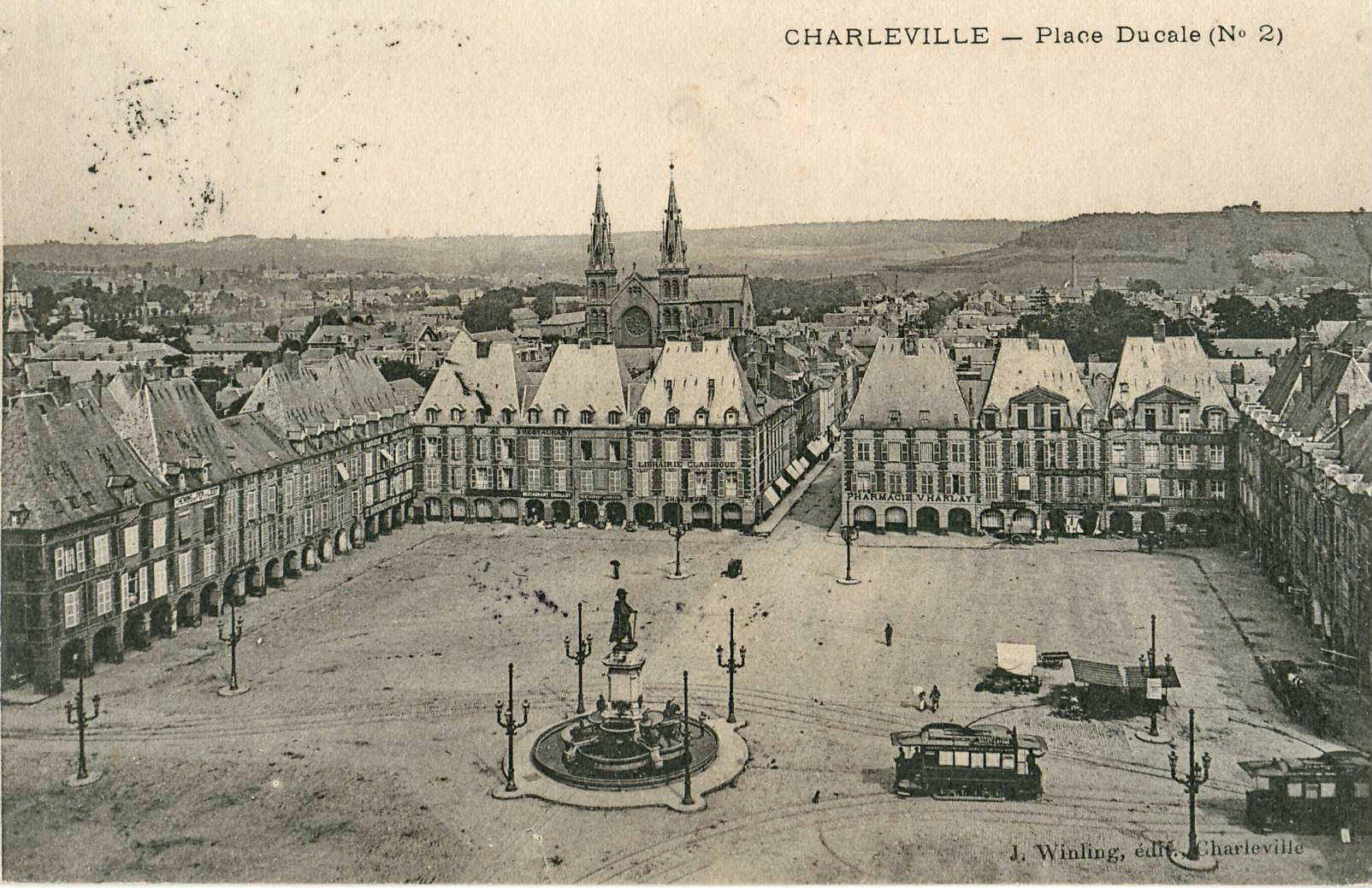 Carte postale ancienne éditée par J. Winling, éditeur à Charleville :CHARLEVILLE - Place Ducale (N°2)On distingue nettement la bifurcation de deux des lignes du tramway de Charleville-Mézières, et les évitements de ces lignes à voie unique